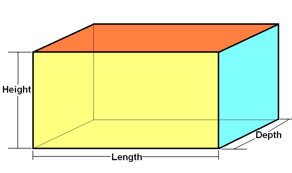 Rectangular cuboid